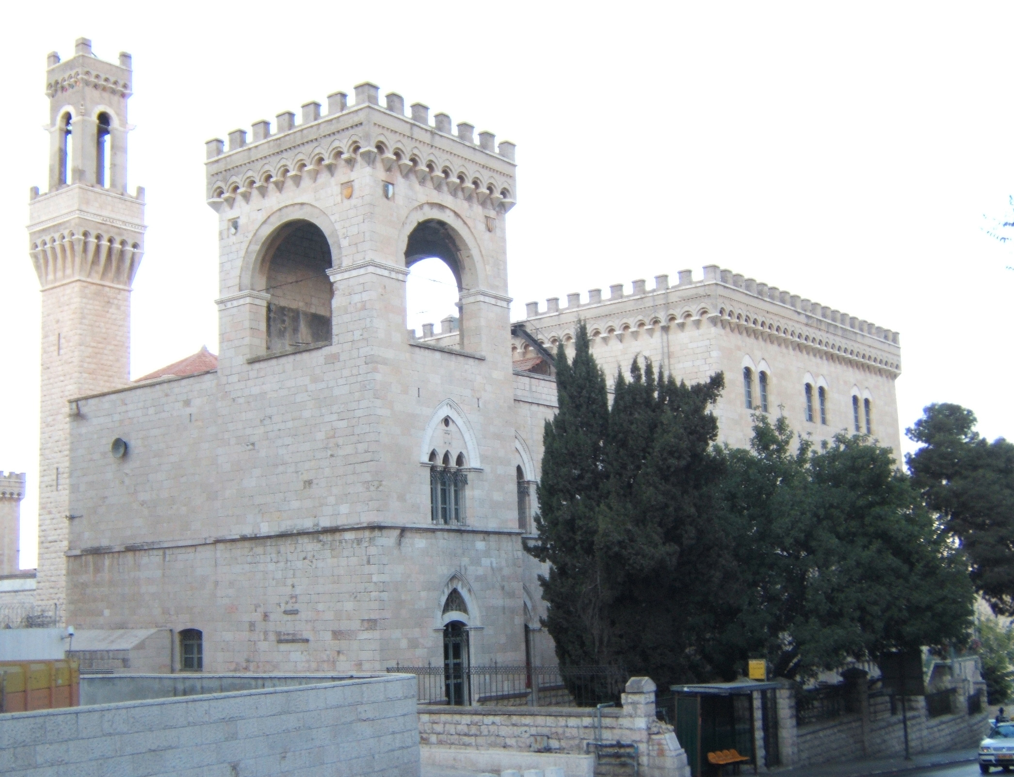 Italian Hospital, Jerusalem